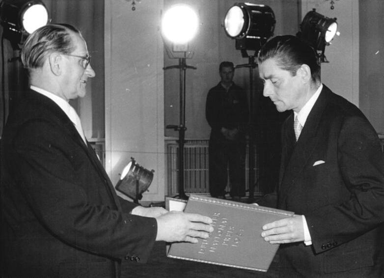 Berlin, Nationalpreis an Fritz Kühn Zentralbild Heilig 7.10.1954 Verleihung des Nationalpreises 1954 am 5. Jahrestag der Gründung der Deutschen Demokratischen Republik. In einem Festakt im Amtssitz des Präsidenten der Deutschen Demokratischen Republik in Berlin-Niederschönhausen zeichnete Präsident Wilhelm Pieck hervorragende Persönlichkeiten des kulturellen und wirtschaftlichen Lebens in der Deutschen Demokratischen Republik mit dem Nationalpreis 1954 aus. UBz: Staatssekretär [Max] Opitz überreicht im Namen des Präsidenten Wilhelm Pieck dem Kunstschmied Fritz Kühn den Nationalpreis 3. Klasse. Abgebildete Personen: Kühn, Fritz Prof.: Kunstschmied, Fotograf, DDR Opitz, Max: Staatssekretär, Chef der Präsidialkanzlei, Vaterländischer Verdienstorden (VVO) in Gold 1965, DDR (GND 132482320)